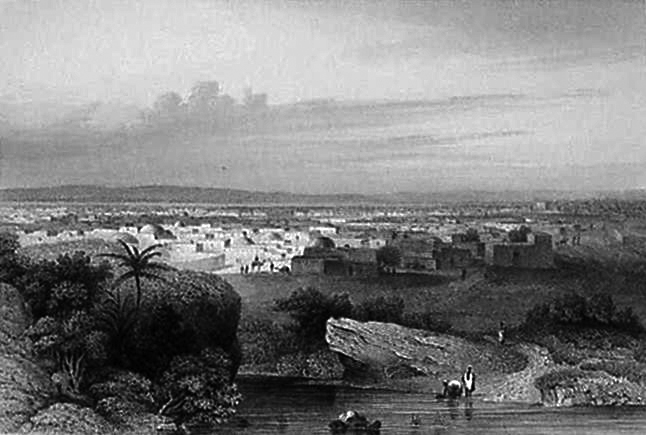 Stahlstich von Kano, Nigeria